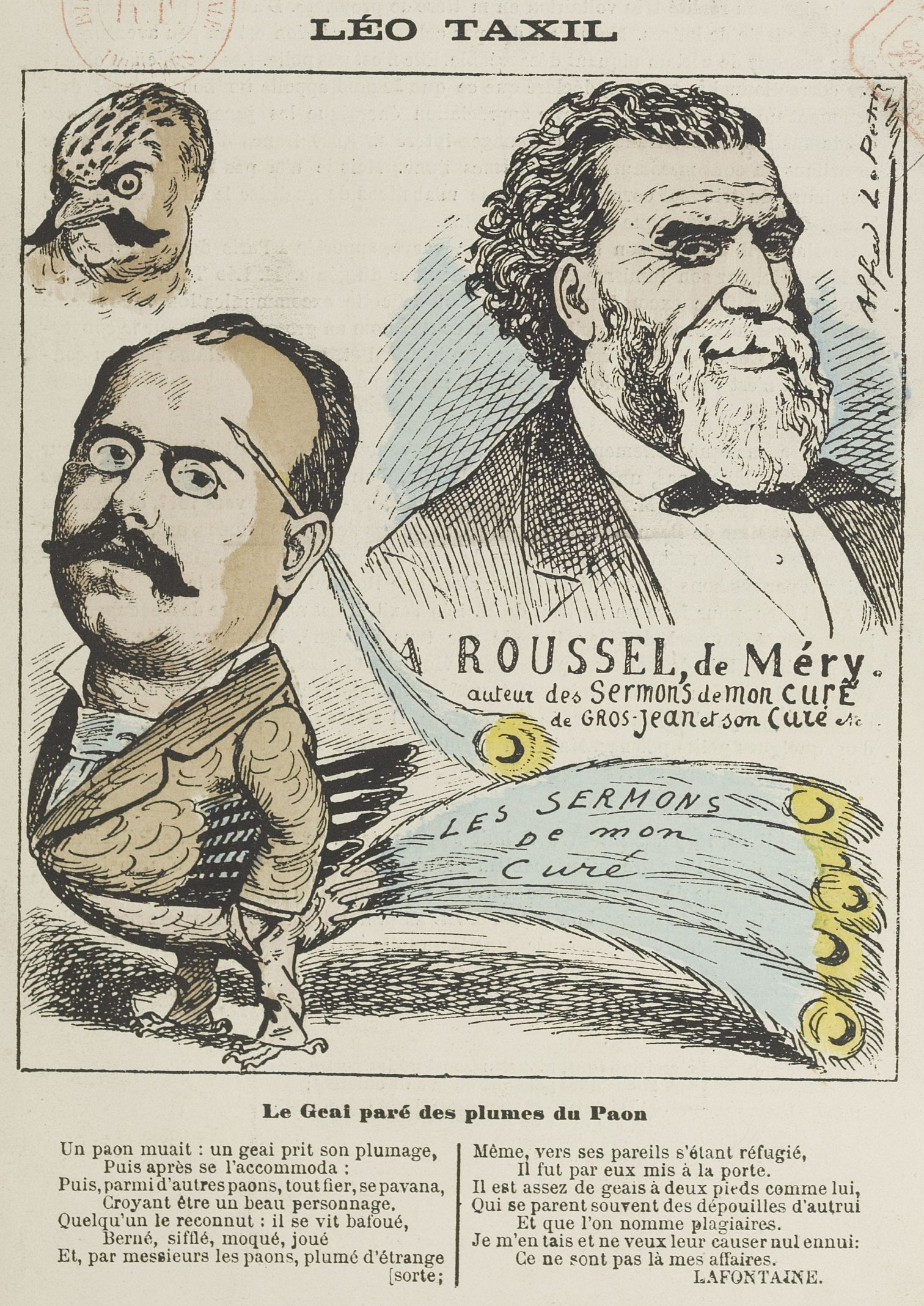 "Le geai [Léo Taxil] paré des plumes du paon [Roussel, de Méry]".